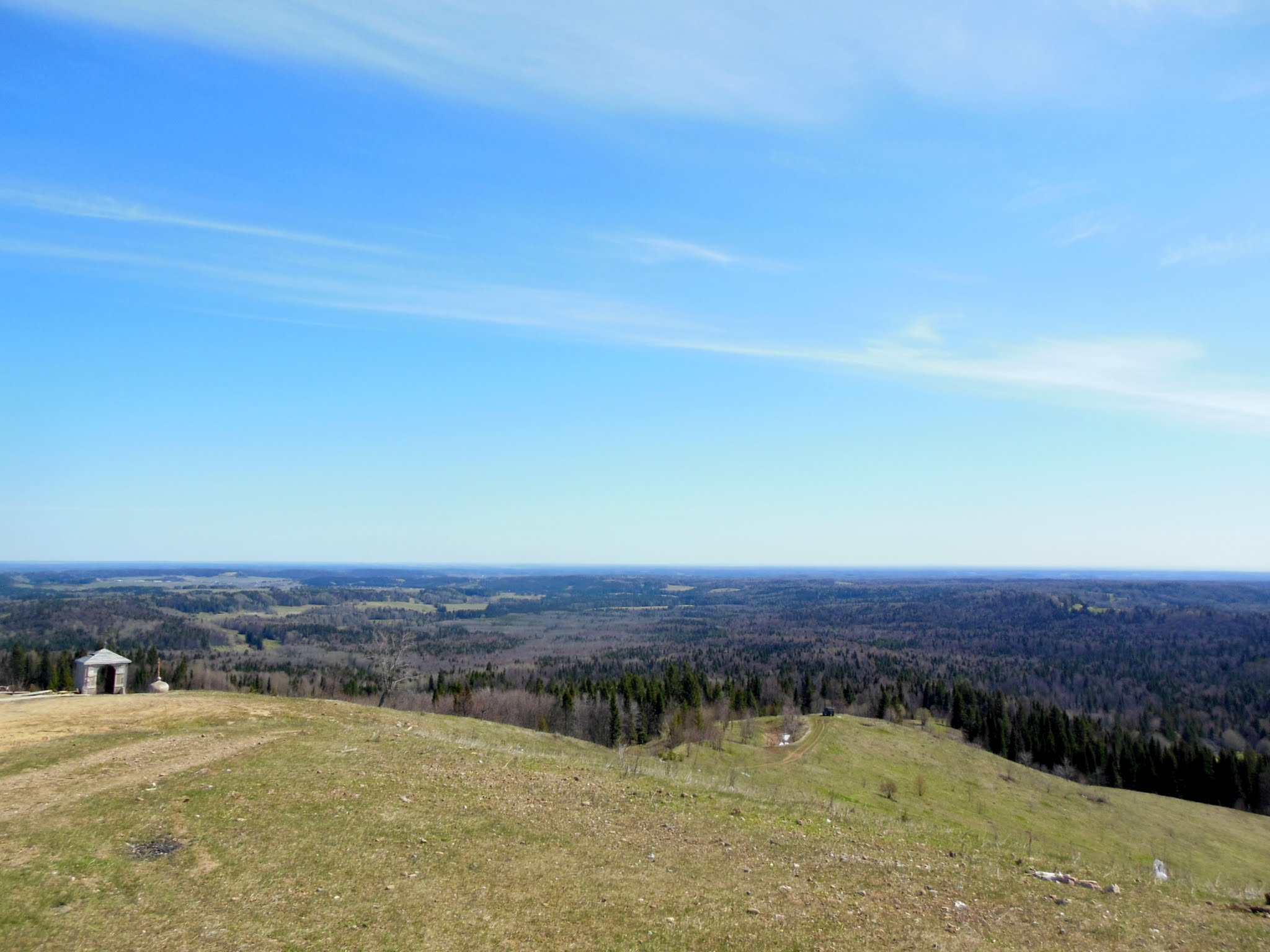 Вид с площадки у Крестовоздвиженского собора в Белогорском монастыре, середина мая 2013